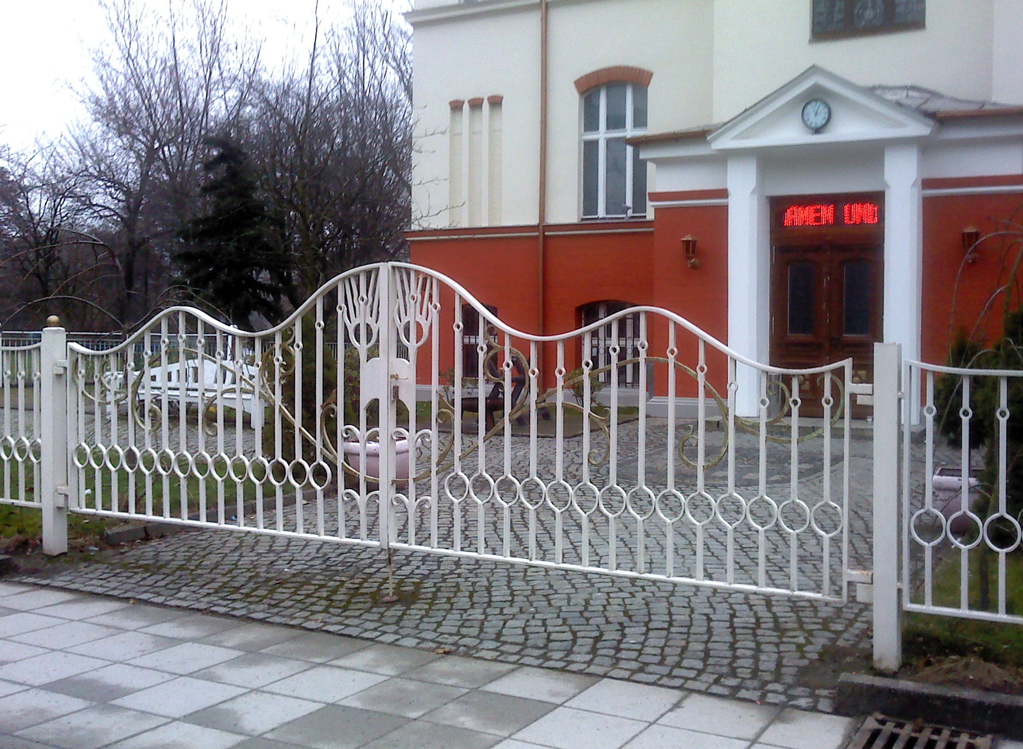 Fennpfuhlpark Zaunanlage um die historische Villa, eine Arbeit der VEB Kunstschmiede Weißensee